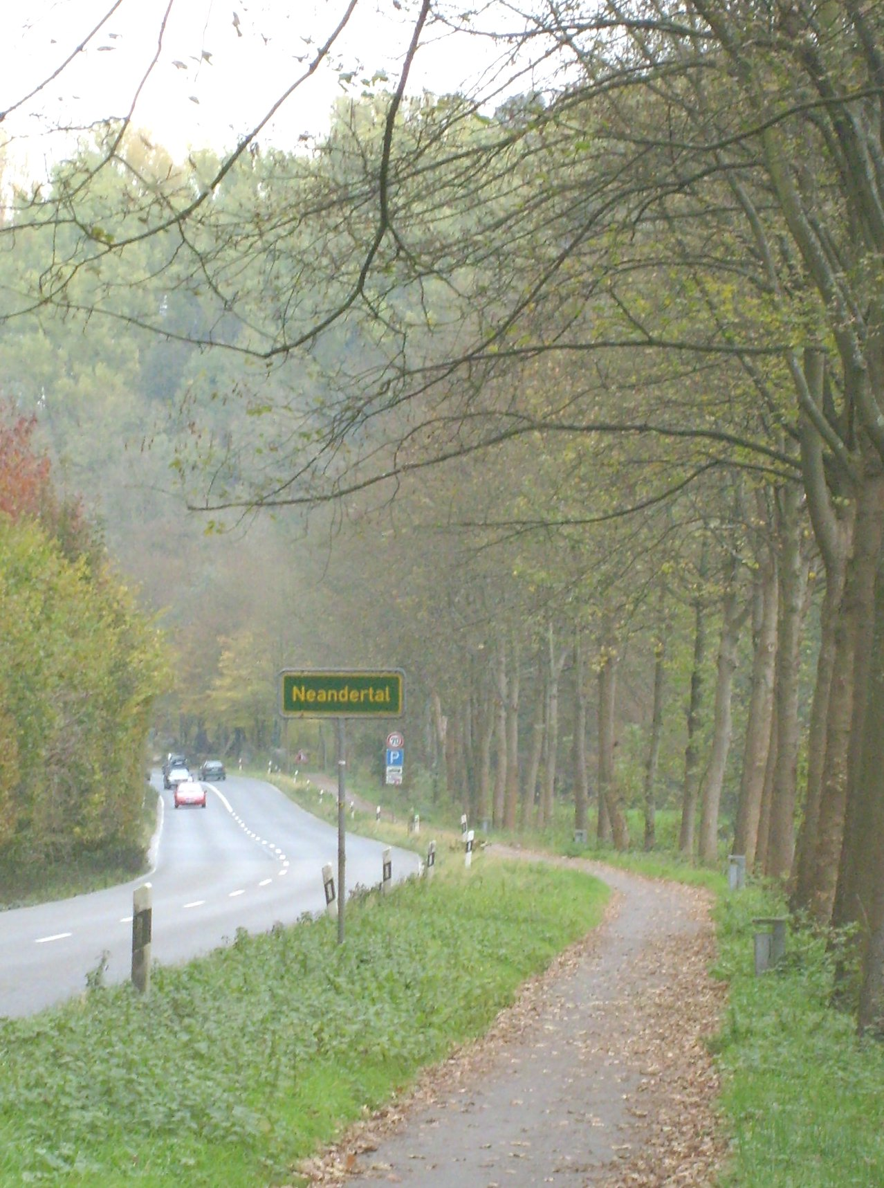 Landesstraße L 357 im Stadtgebiet von Erkrath, Abschnitt zwischen Erkrath und Mettmann, Fahrtrichtung Neandertal. Der Rastplatz „Am alten Kalkofen“ mit der Ruine des Feldhofer Kalkofens befindet sich in 500 m Entfernung (hinter Kurve im Hintergrund), der Rabenstein in knapp 2 km Entfernung